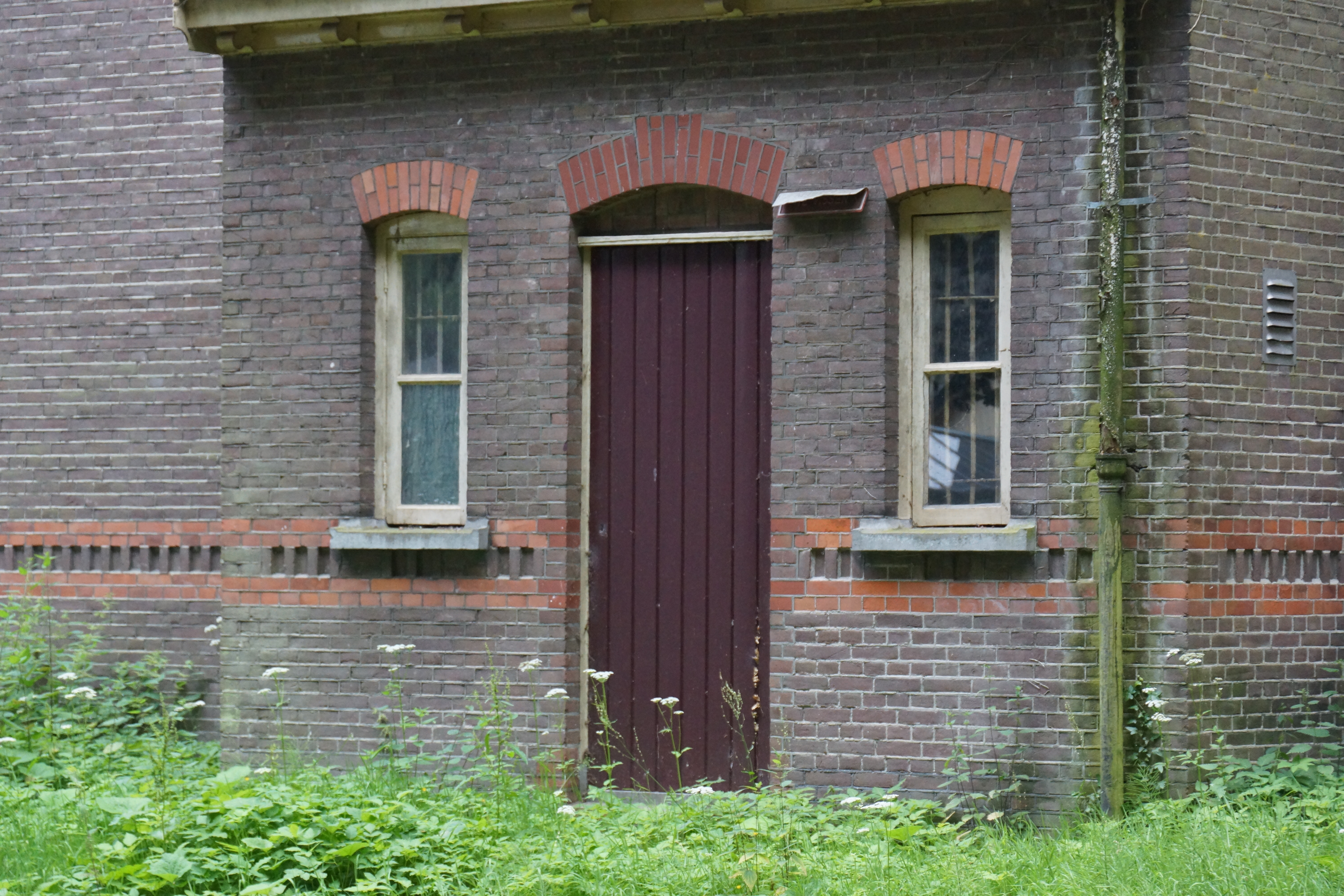 Kruisberg Doetinchem verblijfsgebouw 'De flat' uit 1899 150614 (5)